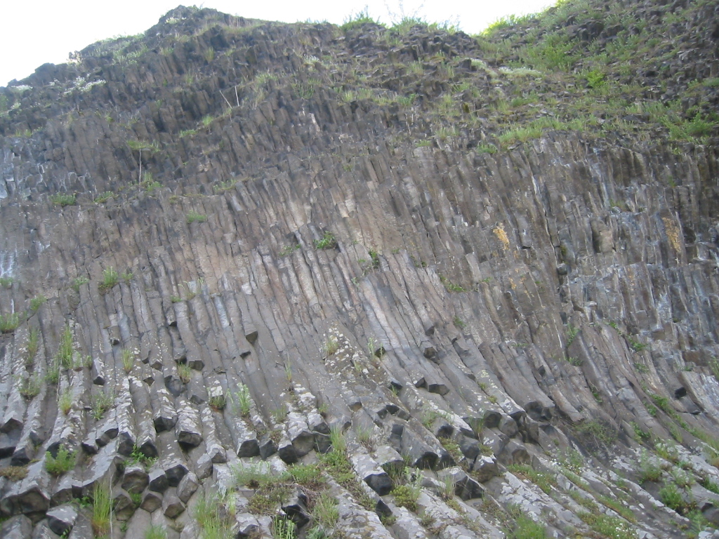 Säulen-Basalt, Parkstein ( Bayern, Oberpfalz)